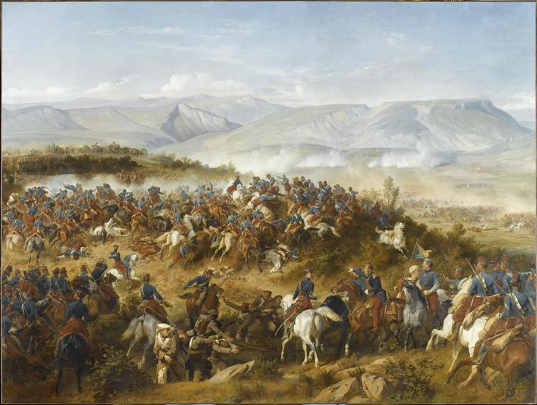 Chasseurs d'Afrique à la bataille de Balaclava (charge de la brigade légère) commandé par le général d'Allonville